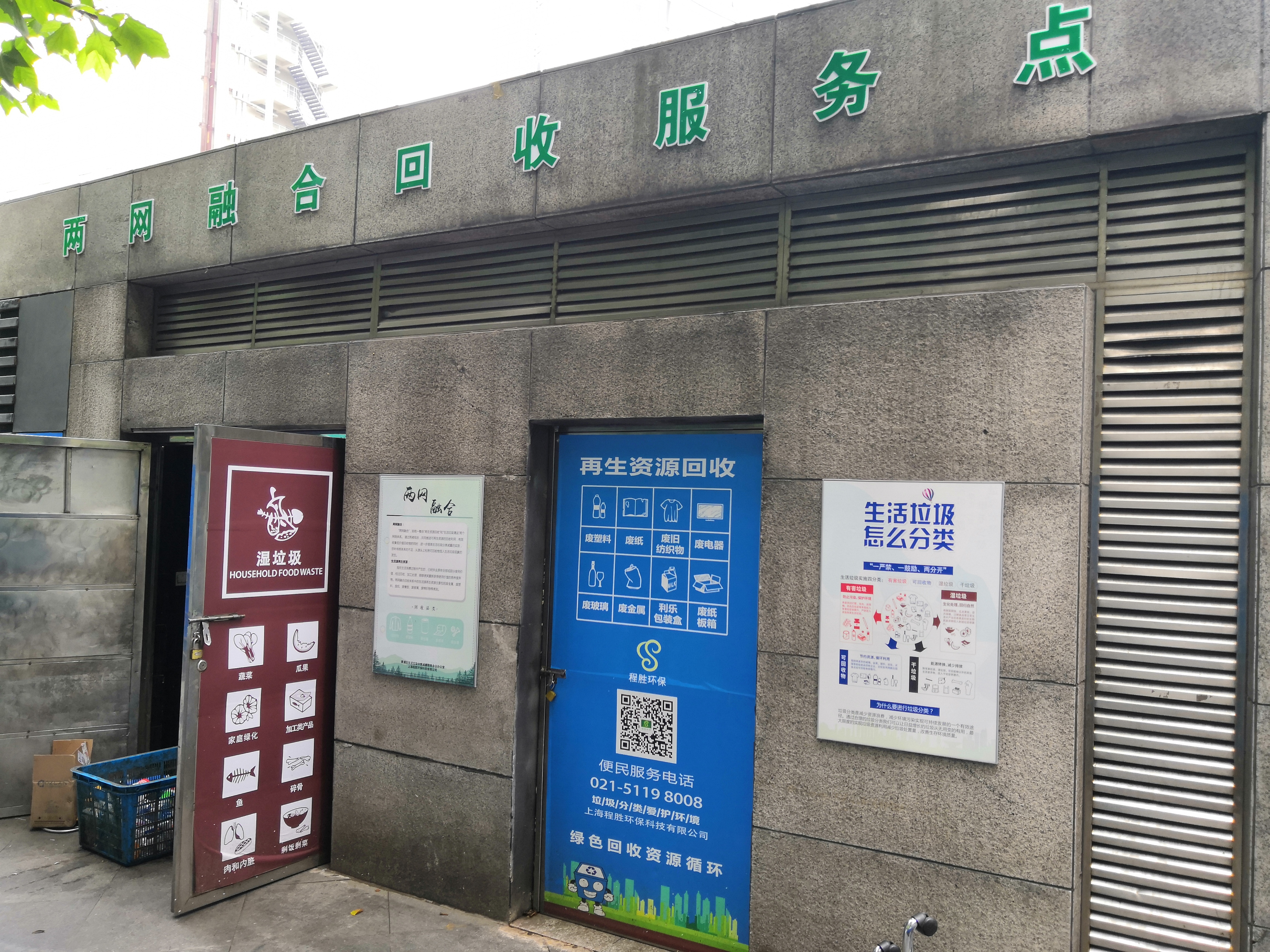 中文（中国大陆）: 上海市人民路四明公所附近的“两网融合”垃圾回收点